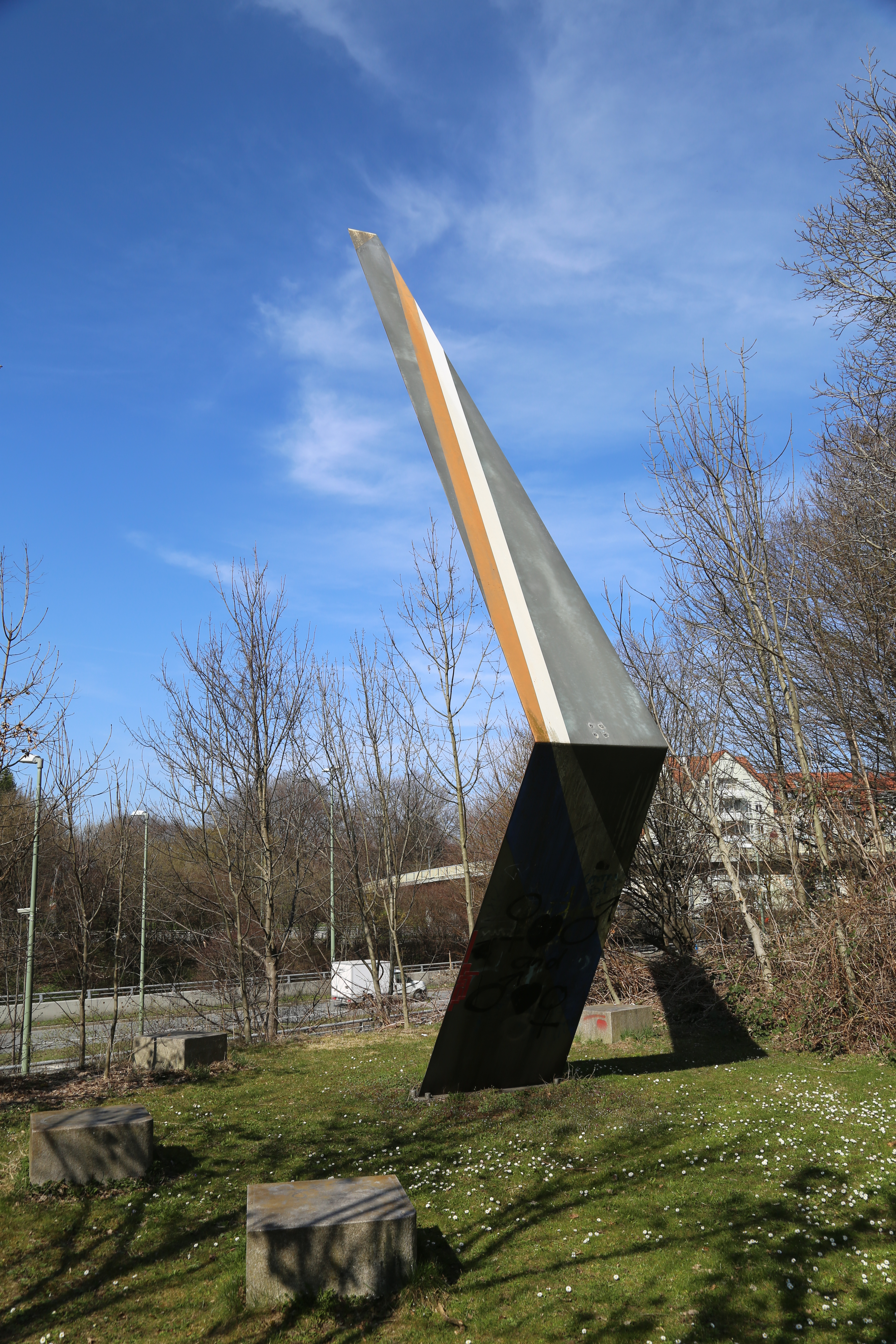 Das Kunstwerk Stadtverweiszeichen von Stefan Wewerka besteht aus zwei sich gegenüberstehenden Landmarken an der Brudermühlstraße in München. Das Werk entstand 1988 als "Kunst am Bau" mit dem Brudermühltunnel.